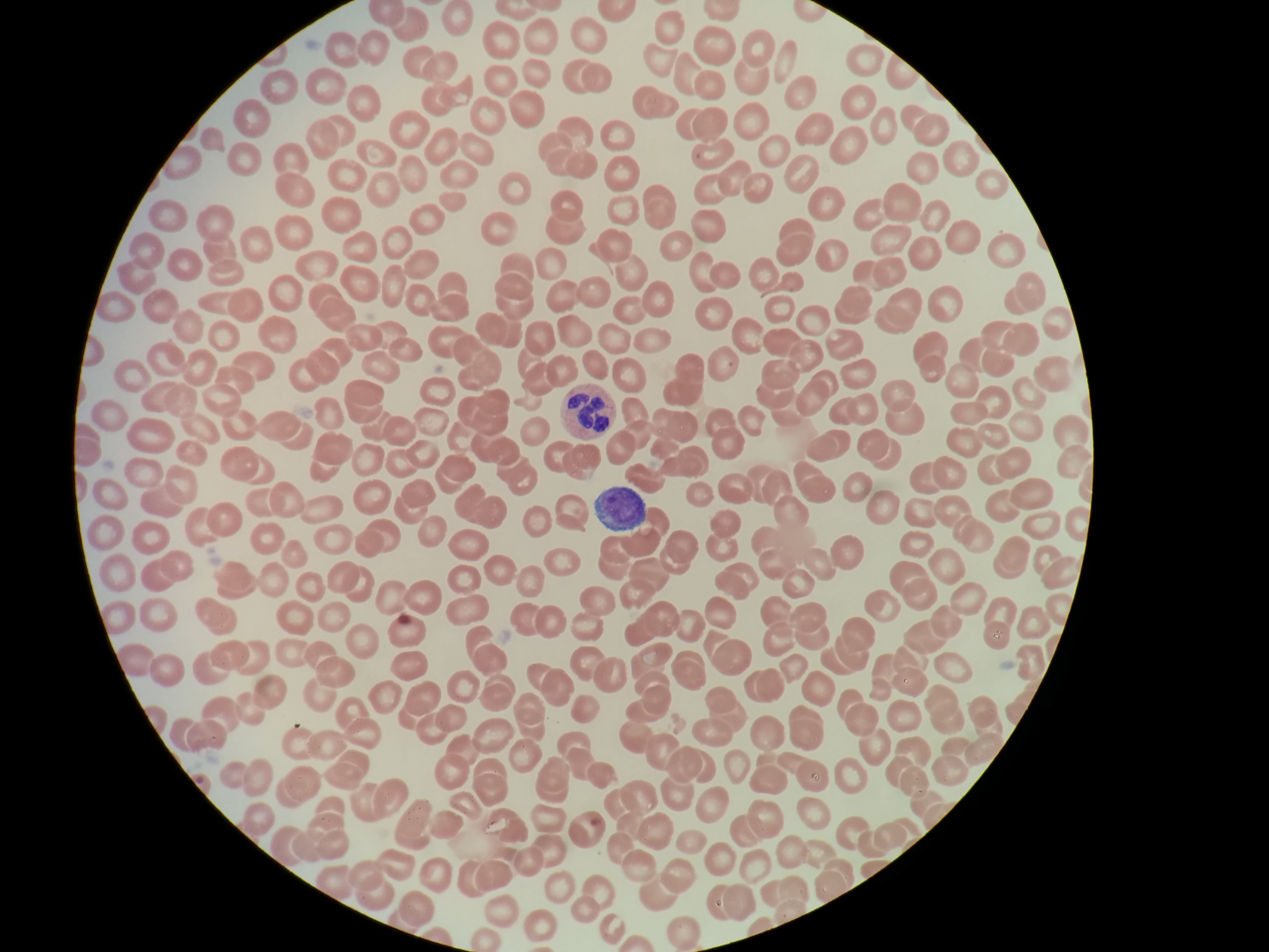 Blutausstrich nach Pappelheim efärbt